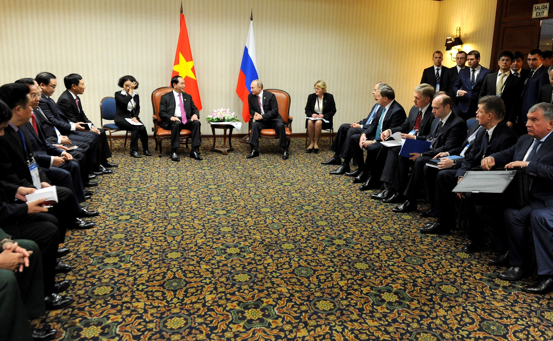 Встреча Президента России Владимира Путина с Президентом Социалистической Республики Вьетнам Чан Дай Куангом